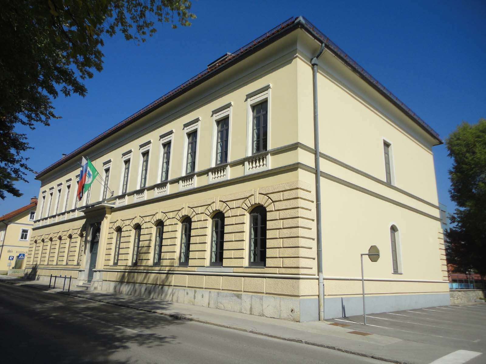 Gimnazija Kočevje